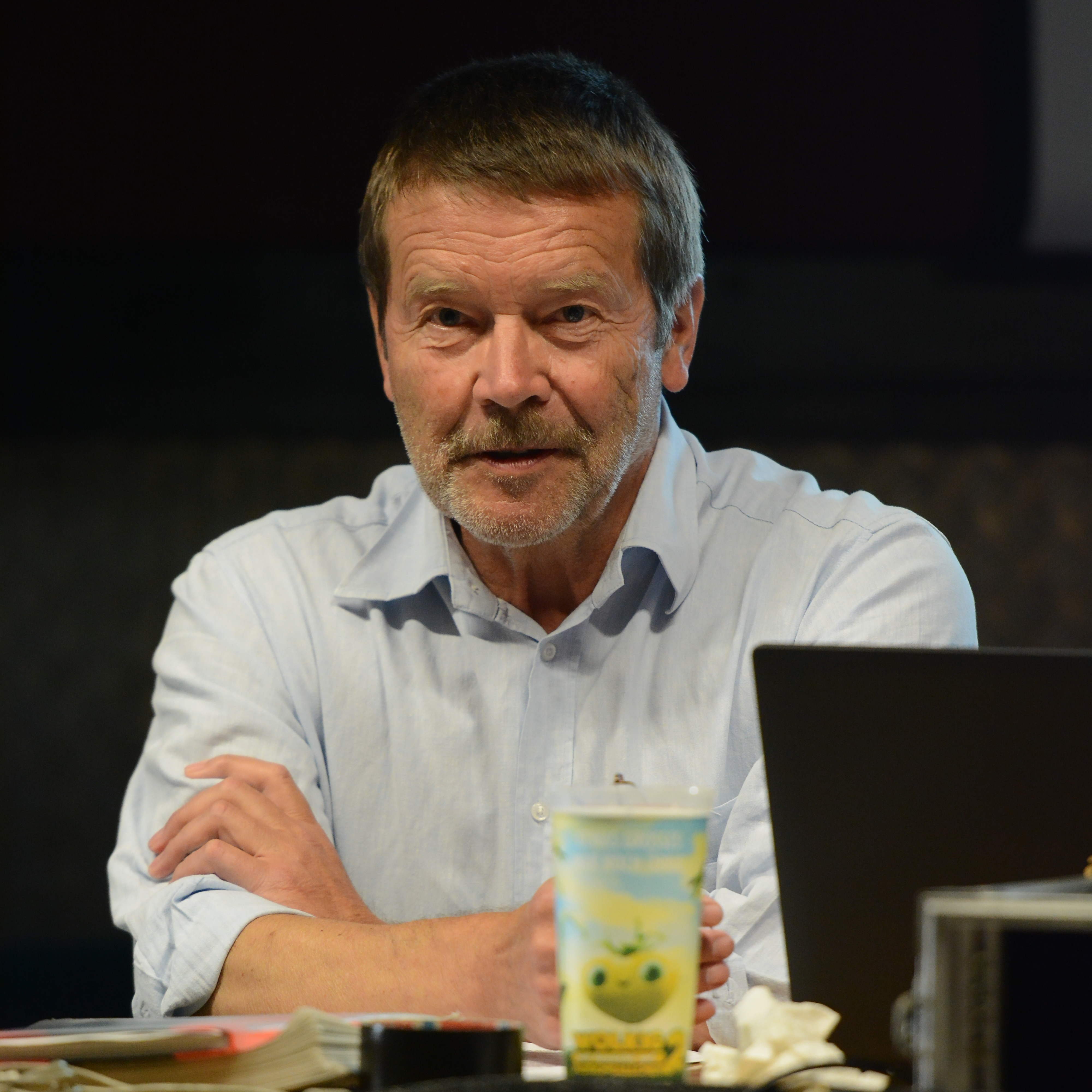 Wolfgang Lieb bei einem Vortrag in Duisburg